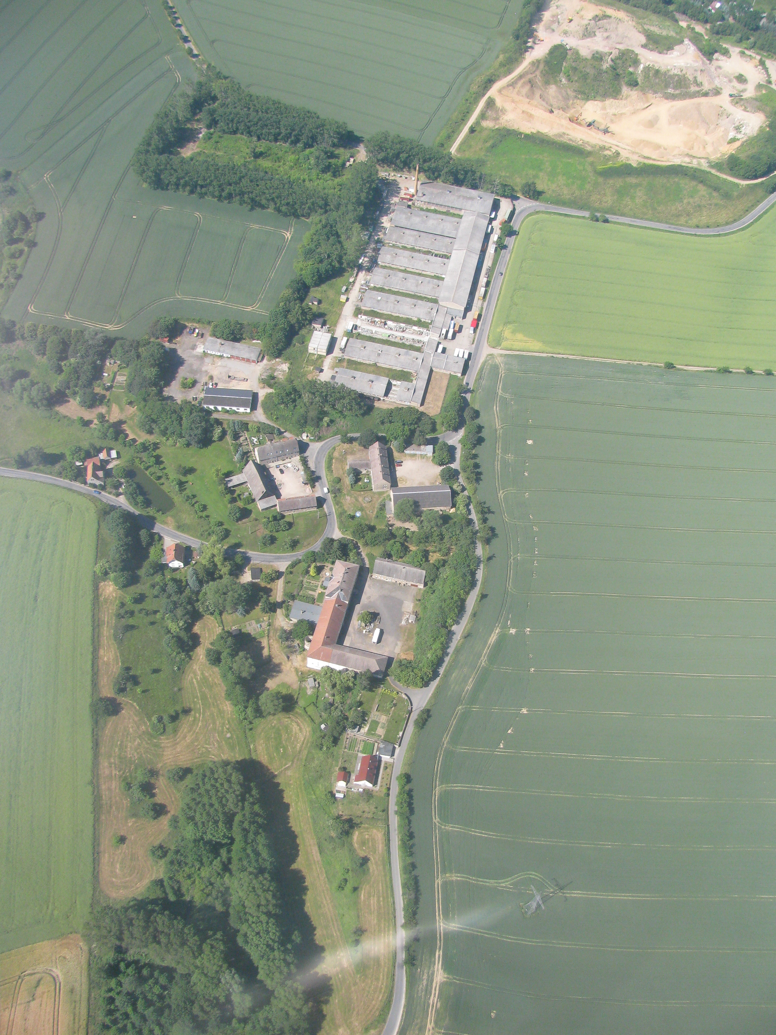 Luftbild Sönitz, Triebischtal